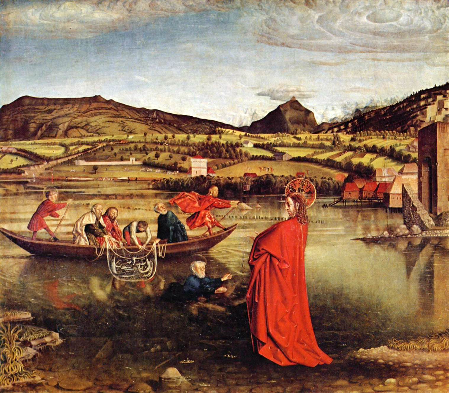 Petrusaltar, Fragment eines Altares der Petrus-Kathedrale in Genf, linker Flügel außen